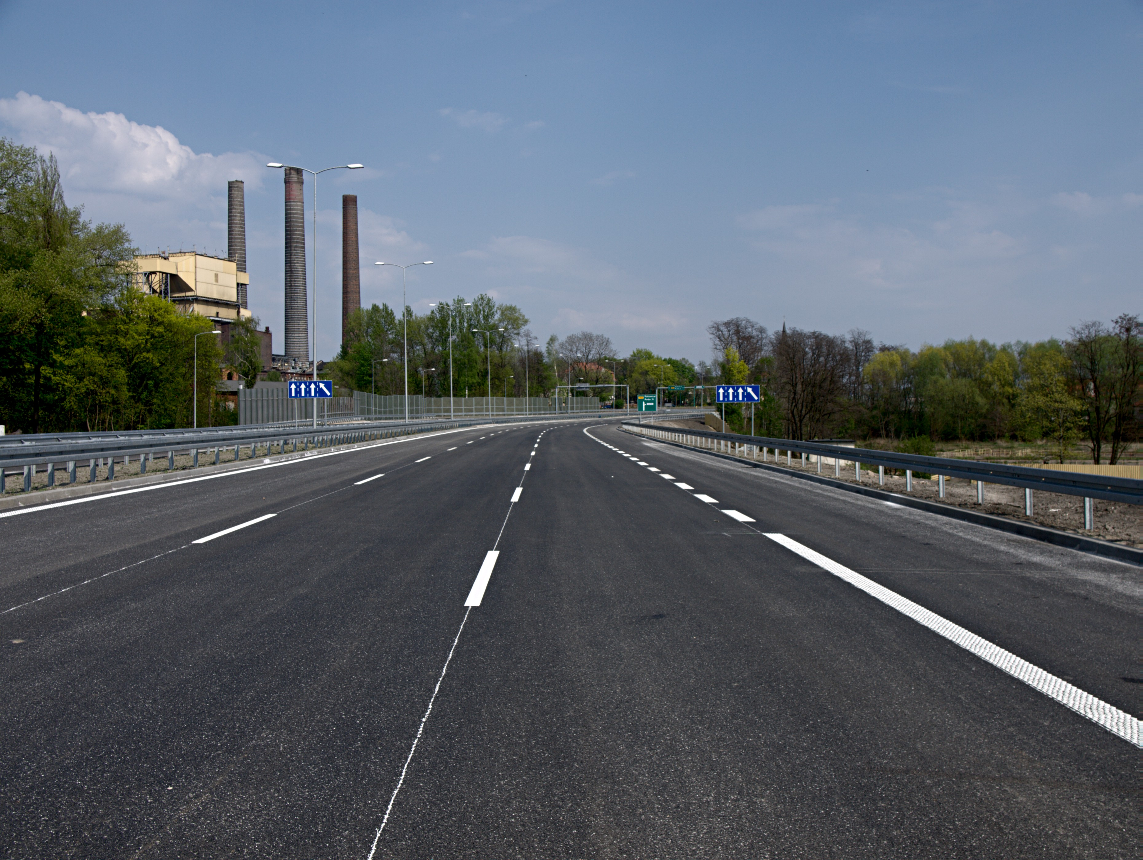 DTŚ w rejonie ulicy Rymera w Zabrzu. Widok w kierunku Rudy Śląskiej.